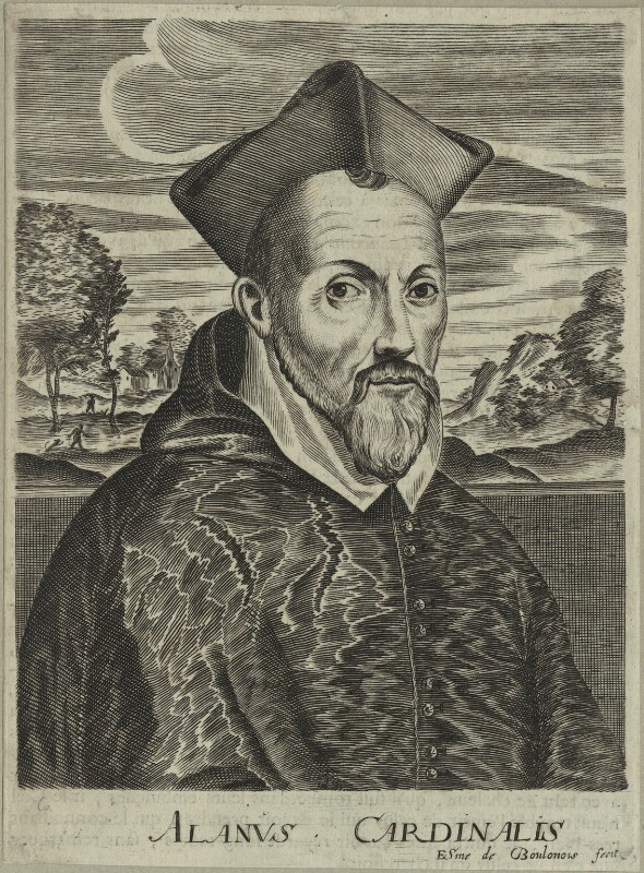 William Allen, grabado de Edme de Boulonois, 1682. National Portrait Gallery